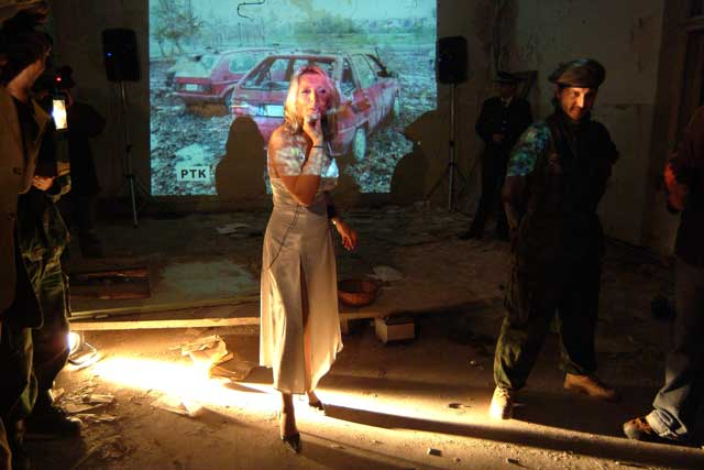 Moja fotografija.